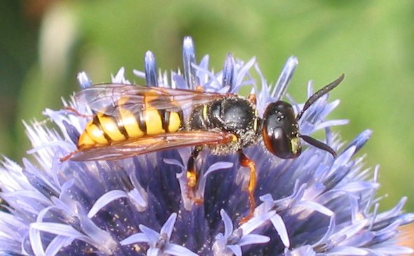 (Bijenwolf zijaanzicht op kogeldistel) Philanthus triangulum on Echinops ritro